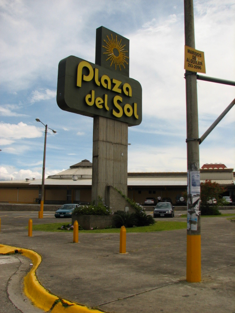 Plaza del Sol, Costa Rica